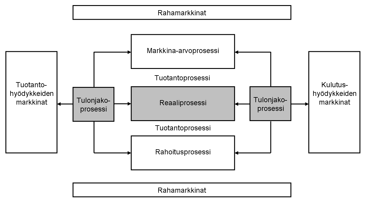 Yritystoiminnan pääprosessit